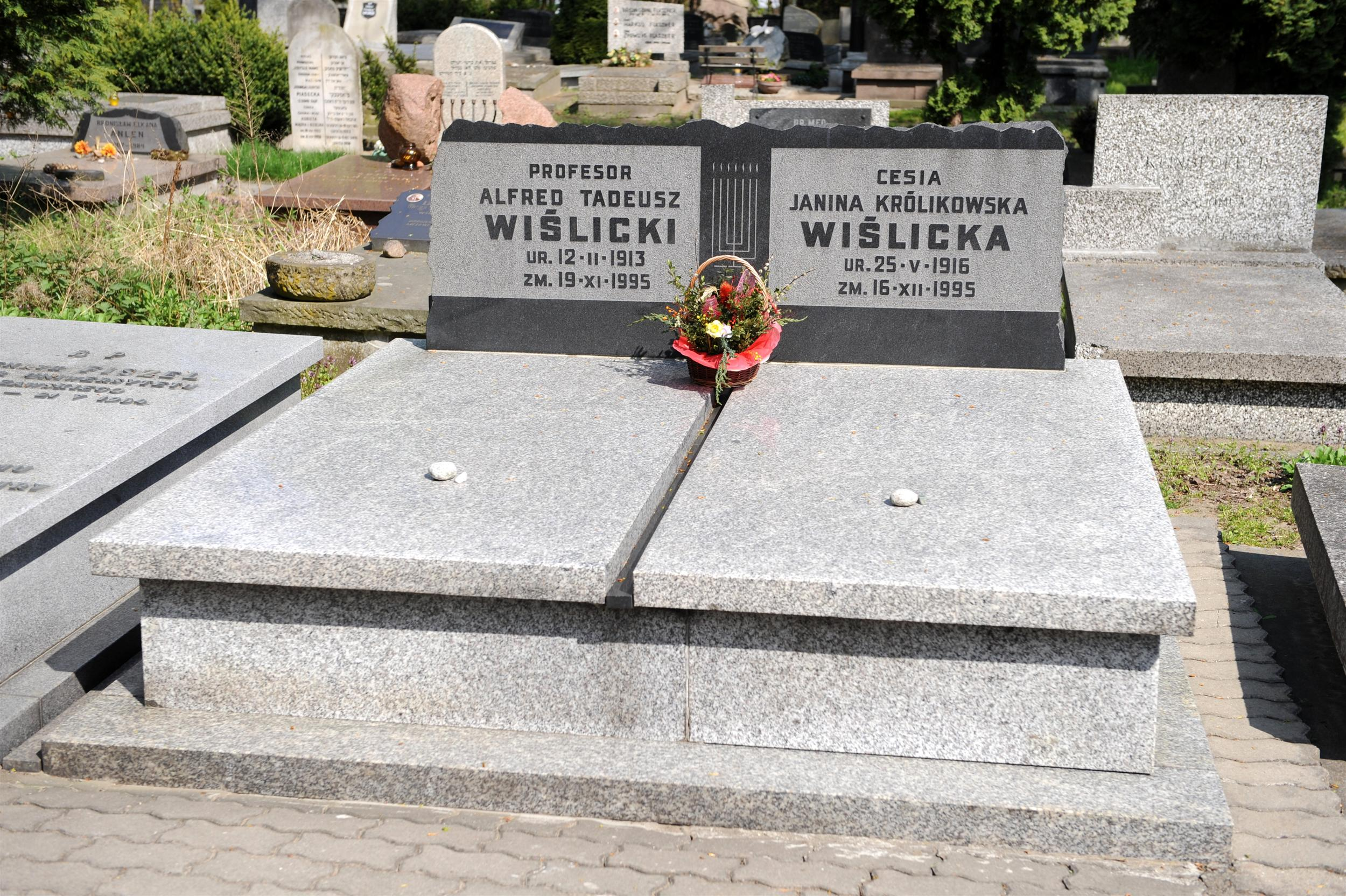 Grób Alfreda Wiślickiego na Cmentarzu Żydowskim w Warszawie